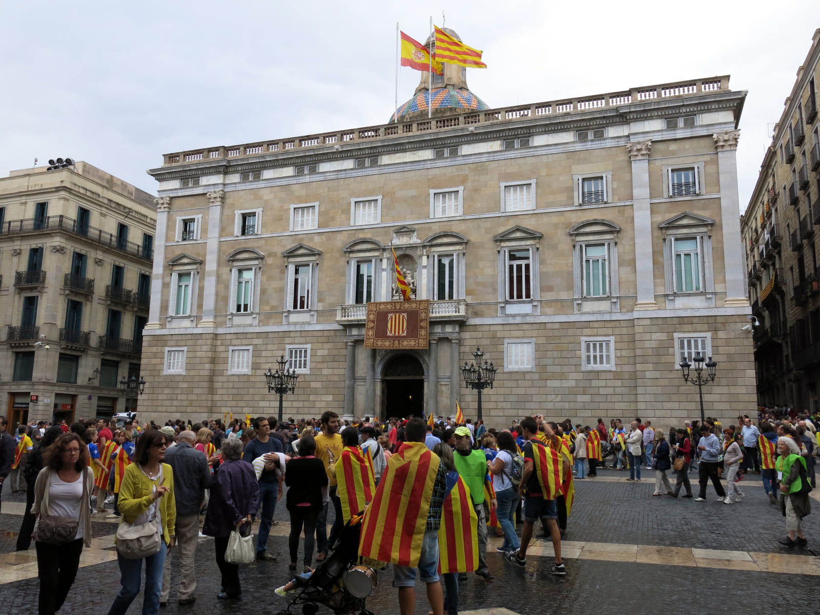 Palau de la Generalitat (Barcelona) Object location41° 22′ 58.01″ N, 2° 10′ 36.01″ E